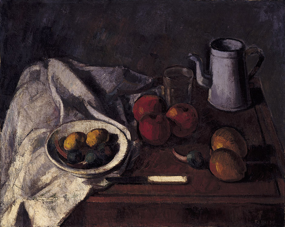 李梅樹作品，1945, 形式是油彩。